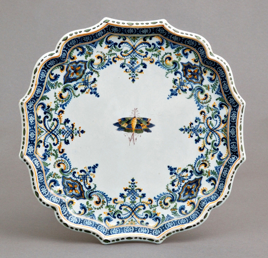 Alzata decorata con motivo a "merletto" e farfalla al centro. Pesaro, Callegari e Casali, 1788.